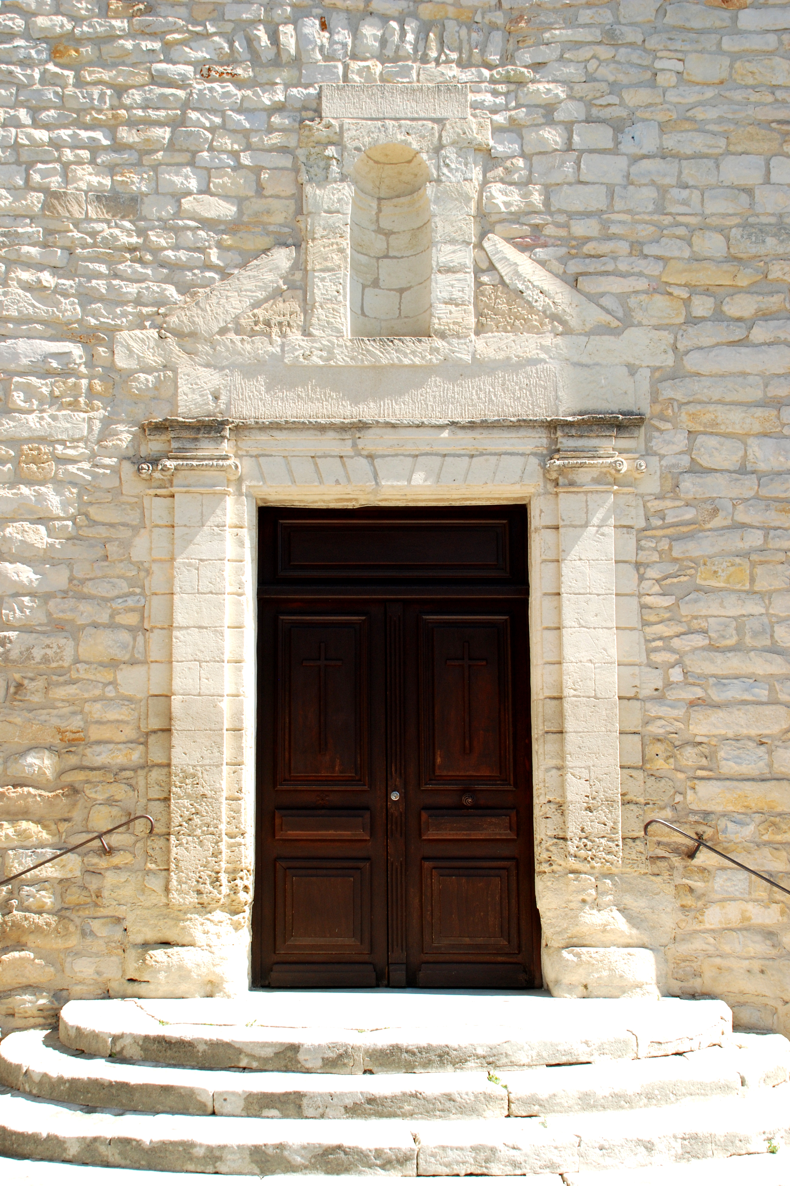 France - Gard - Église Notre-Dame et Saint-André de Congénies